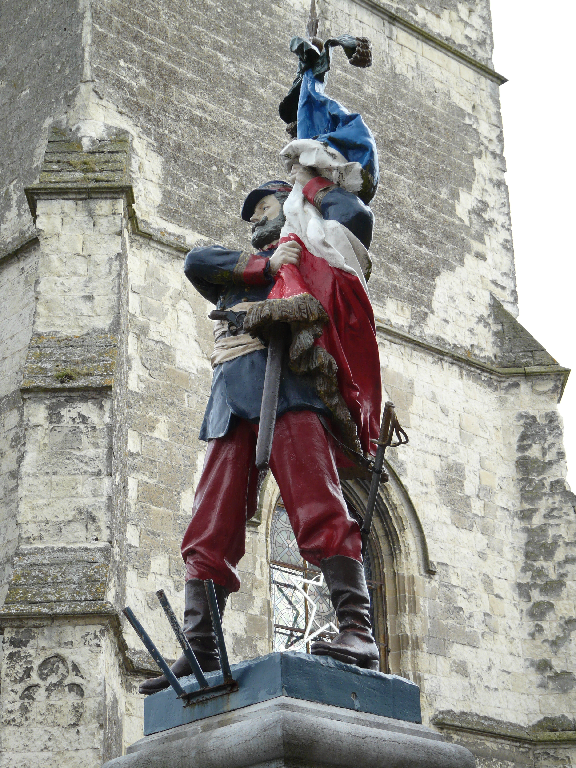 Le monument aux morts de Quiévy (France) (1913)